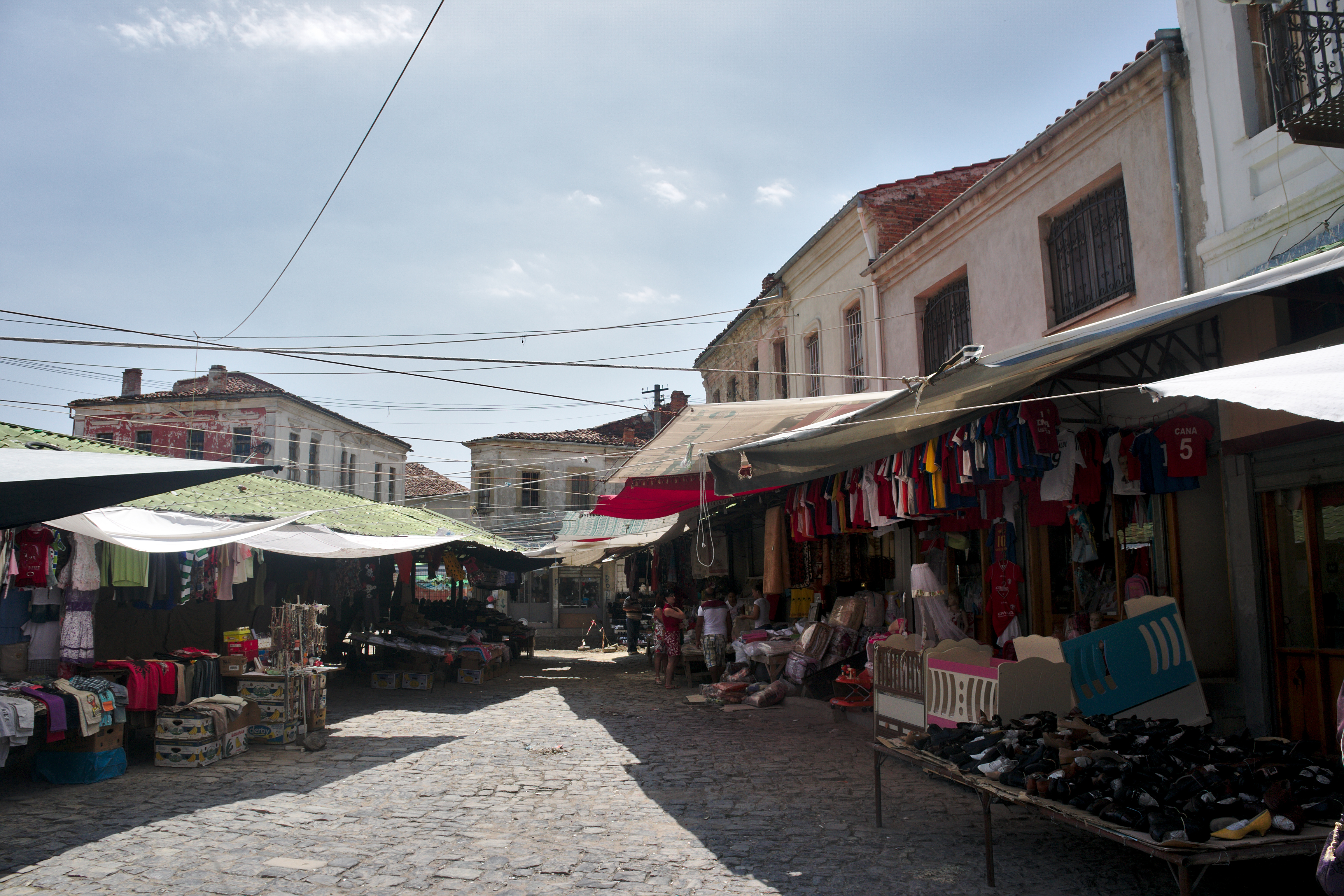 Le Marché de Korçë. Albanie